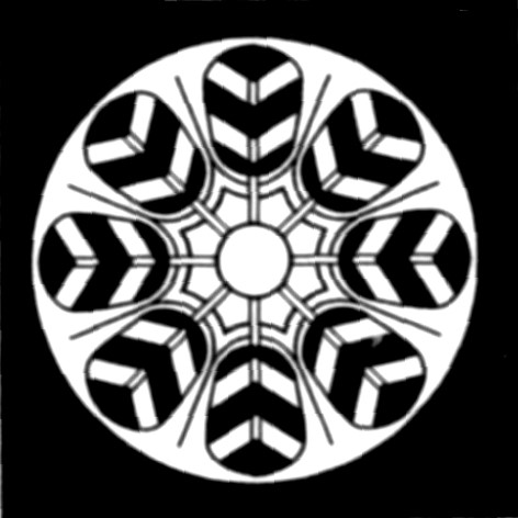 石持に八つ鷹の羽車